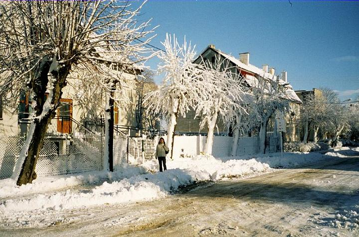 Nowy Dwór Gdański, ul. Dworcowa w zimie